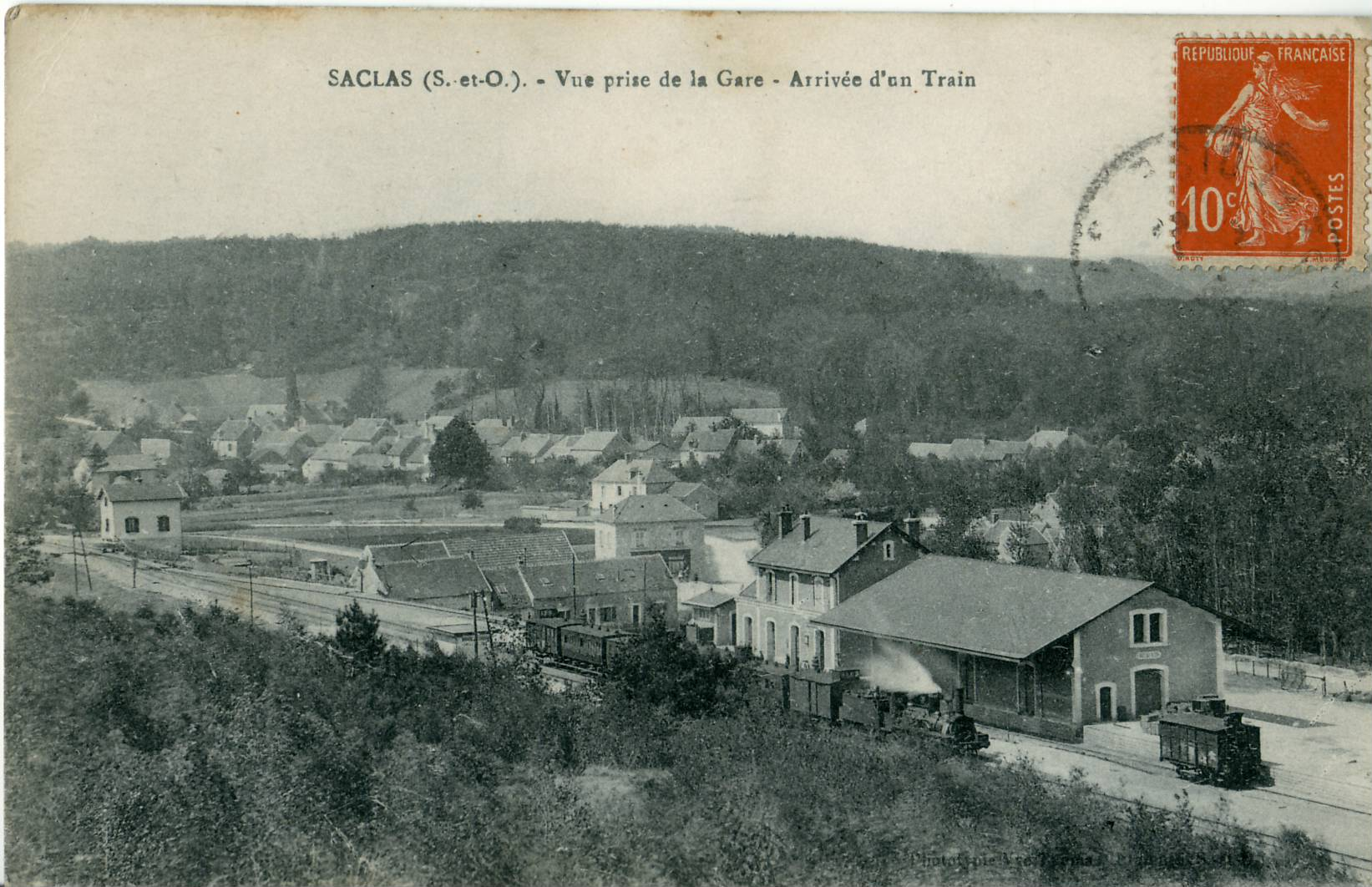 Carte postale ancienne : SACLAS : La Gare